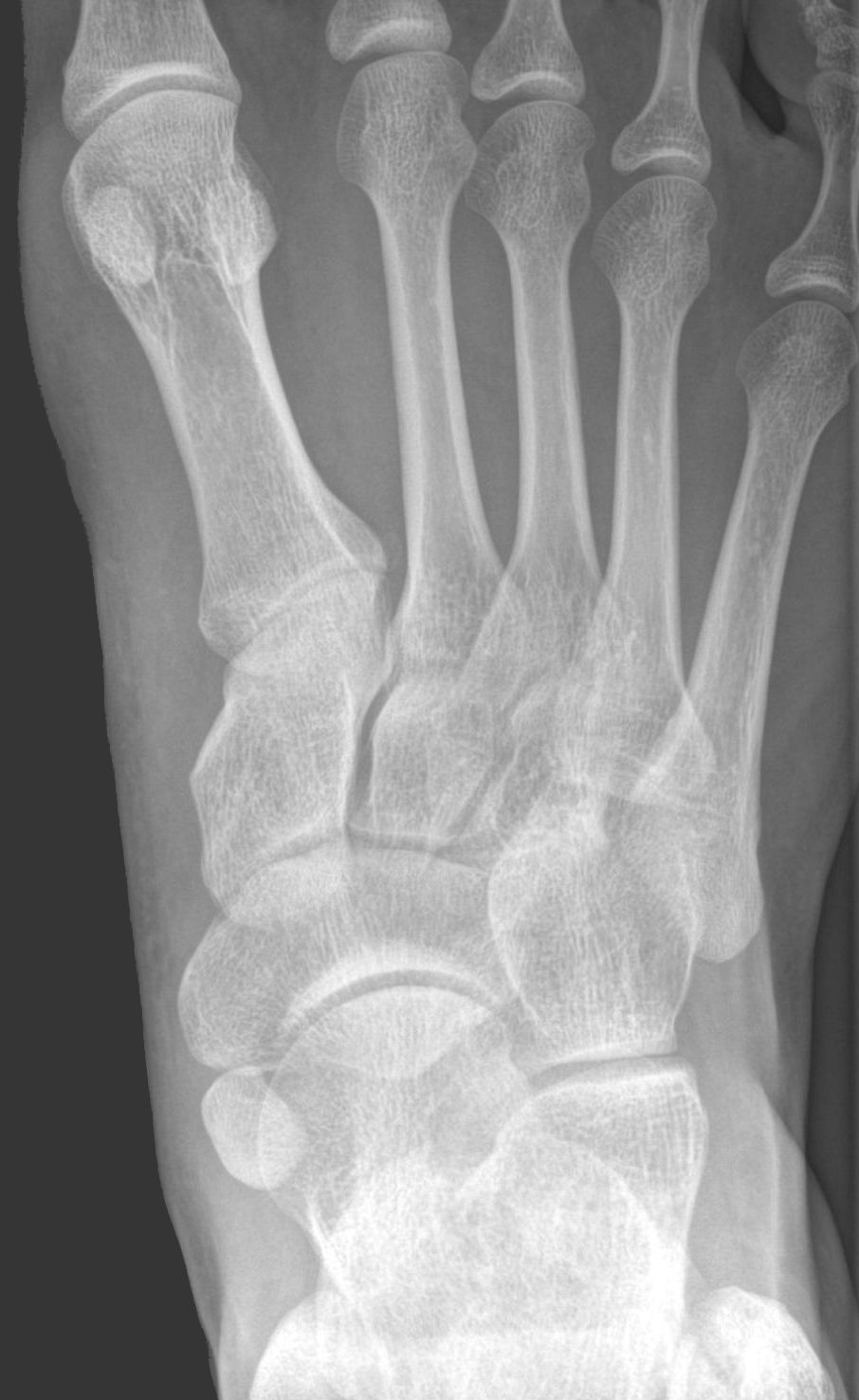 Os tibiale externum im Röntgenbild des Fußes, hier Typ 1 nach Geist, also ein runder, vom Os naviculare isolierter Knochen.